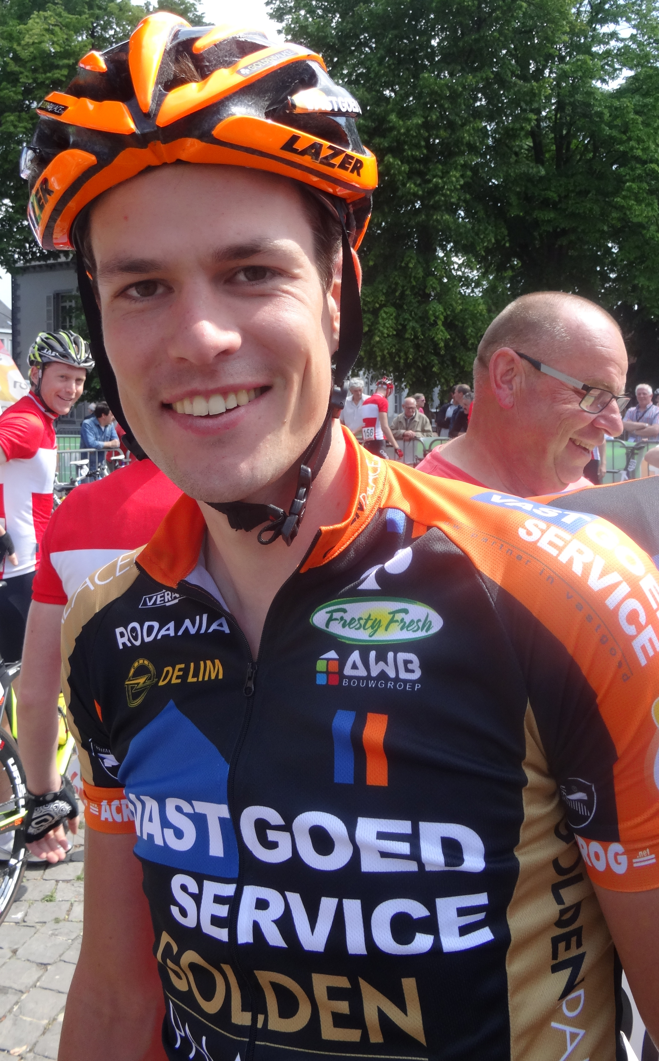 Reportage réalisé le samedi 17 mai à l'occasion du départ du Grand Prix Criquielion 2014 à Boussu, Belgique.